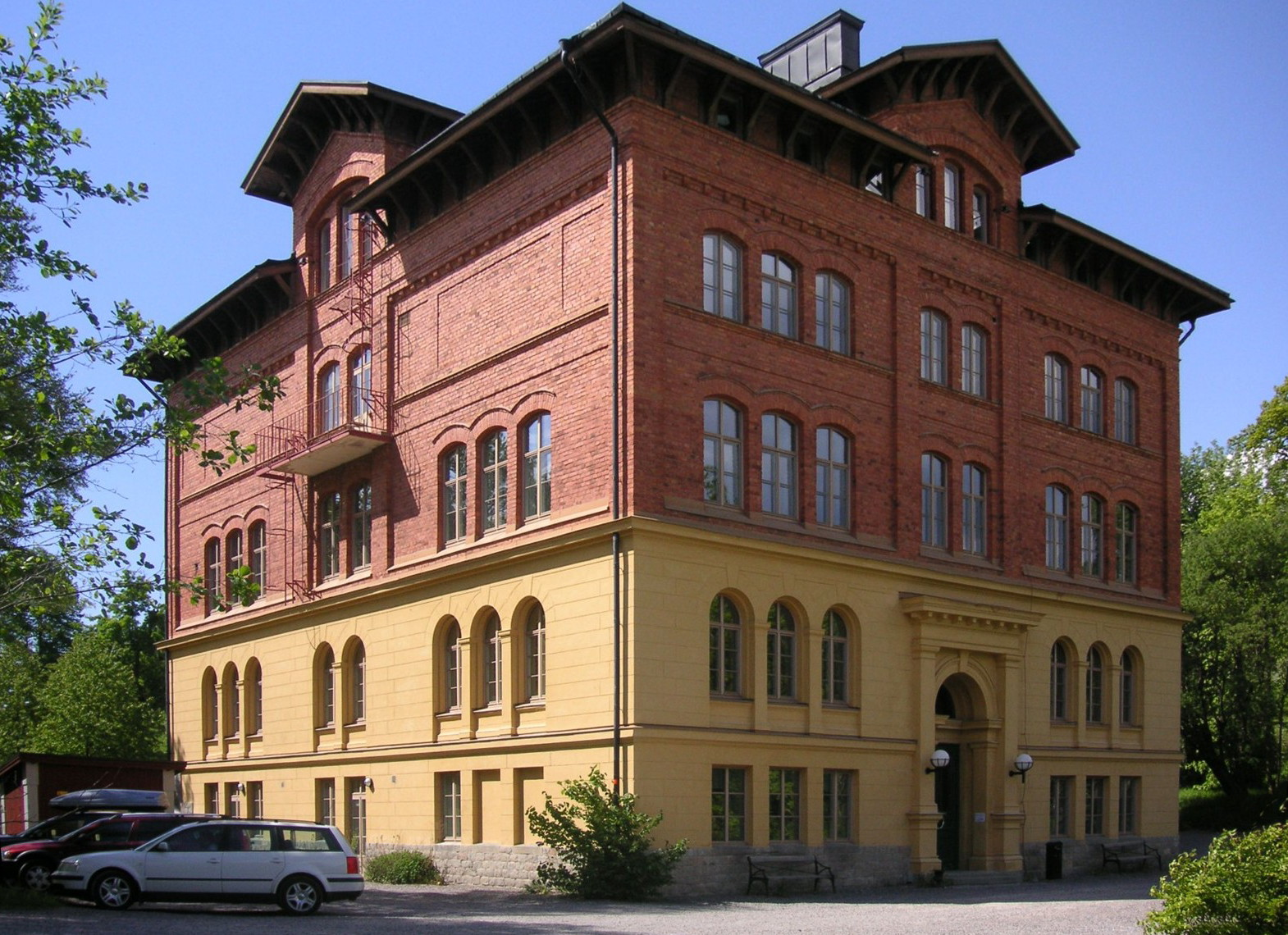 "Rådan 3", Sollentuna, arkitekt Axel Kumlien